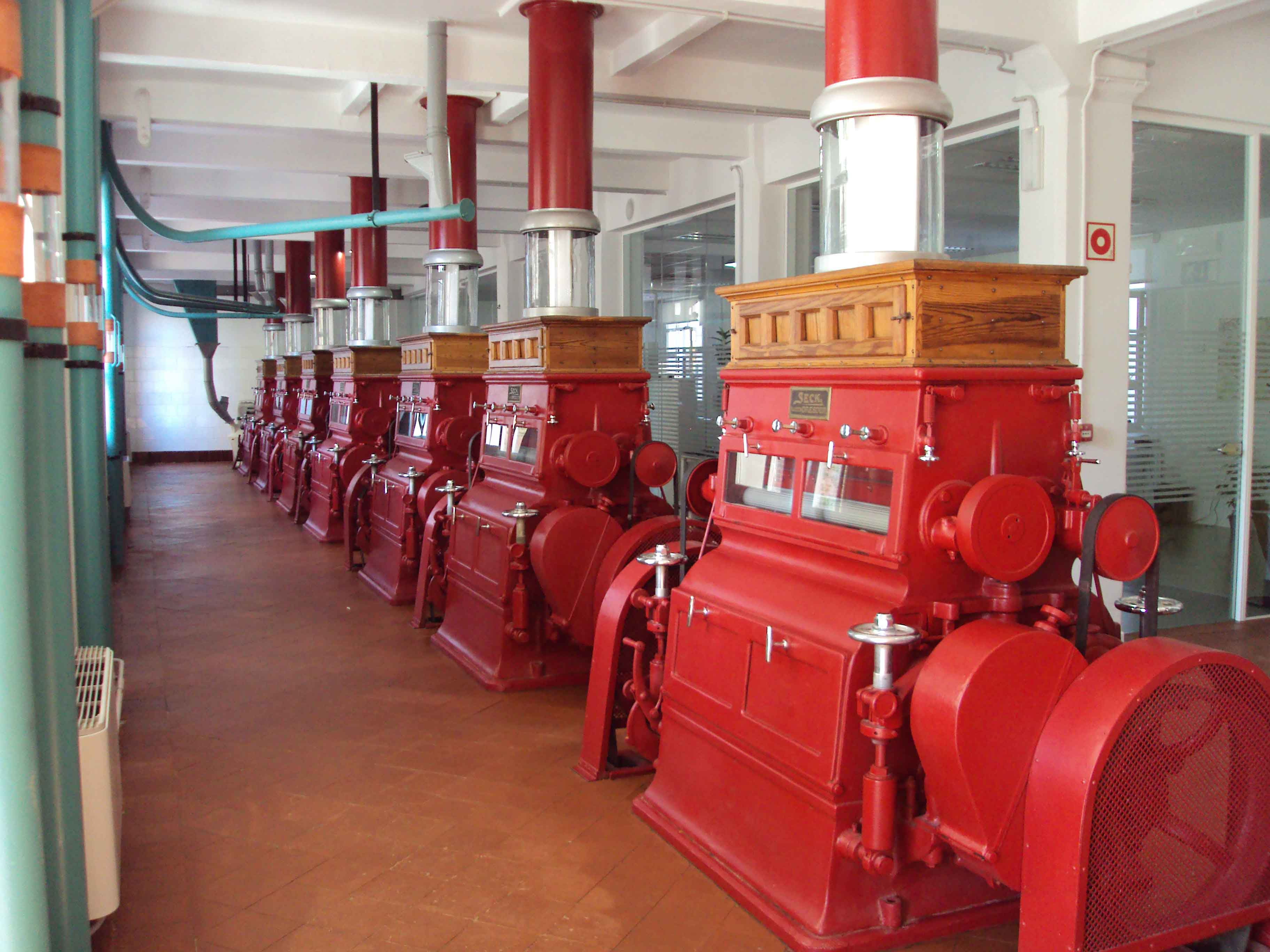 Harino Panadera S.A.